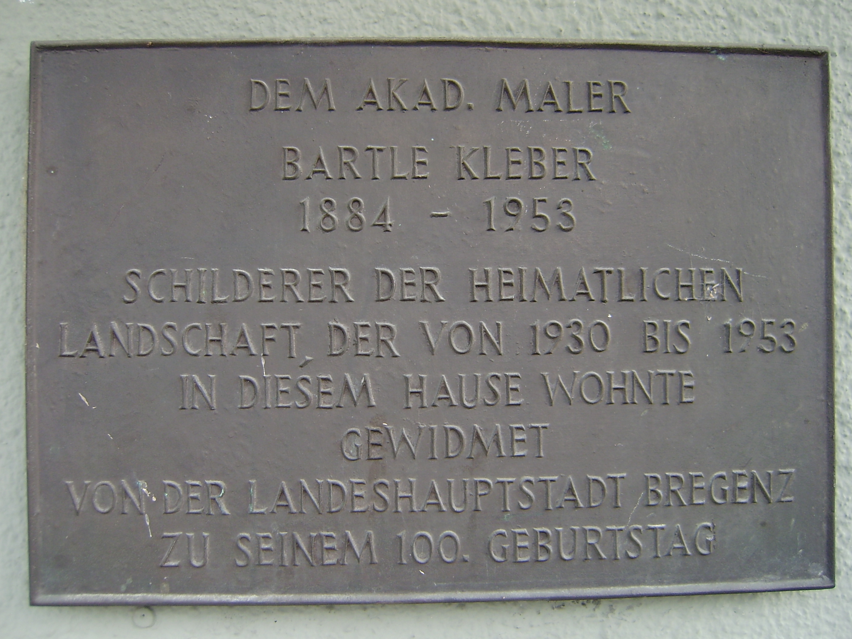 Wohn- und Geschäftshaus, Bahnhofstr 31, Bregenz , Vorarlberg, Österreich, Erinnerungstafel für Bartle Kleber (auch: Bartholomäus Kleber, 1884–1953), Vorarlberger Maler und Grafiker.